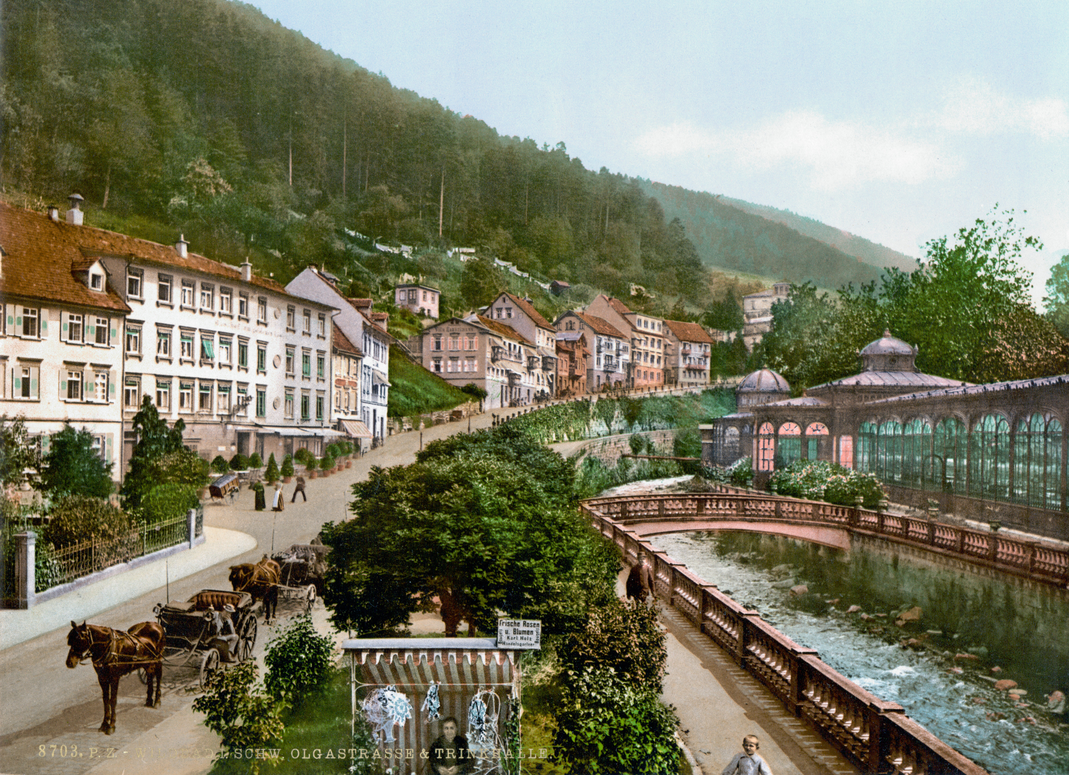 Wildbad im Schwarzwald Olgastraße und Trinkhalle um 1900